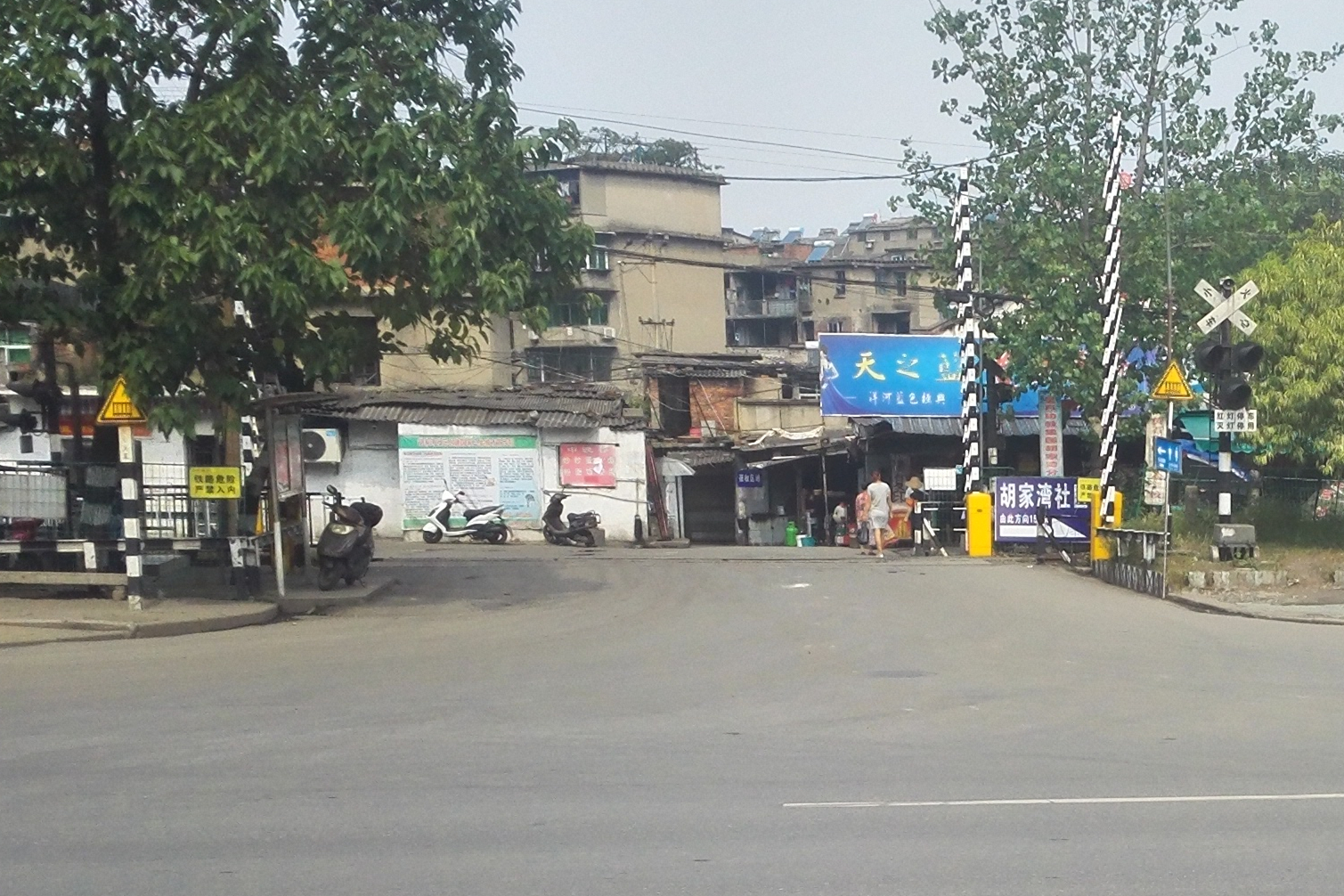 中文（中国大陆）: 黄石东线胡家湾道口。